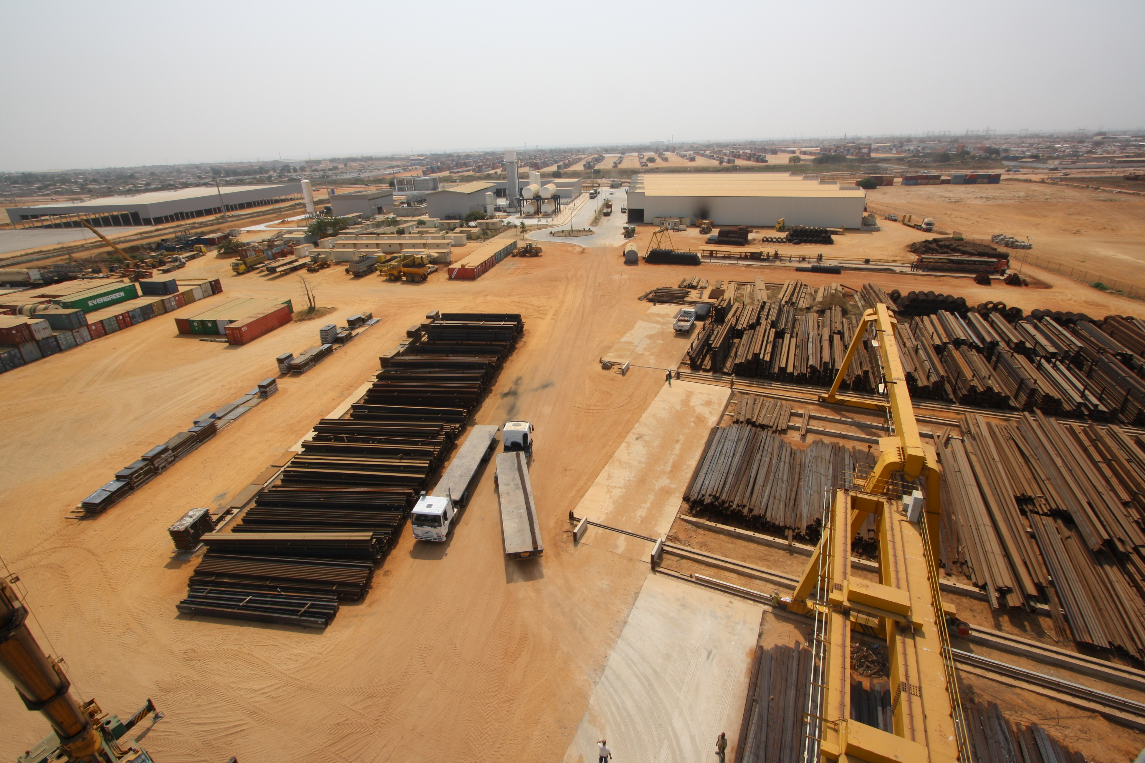 Acail Angola - Viana I